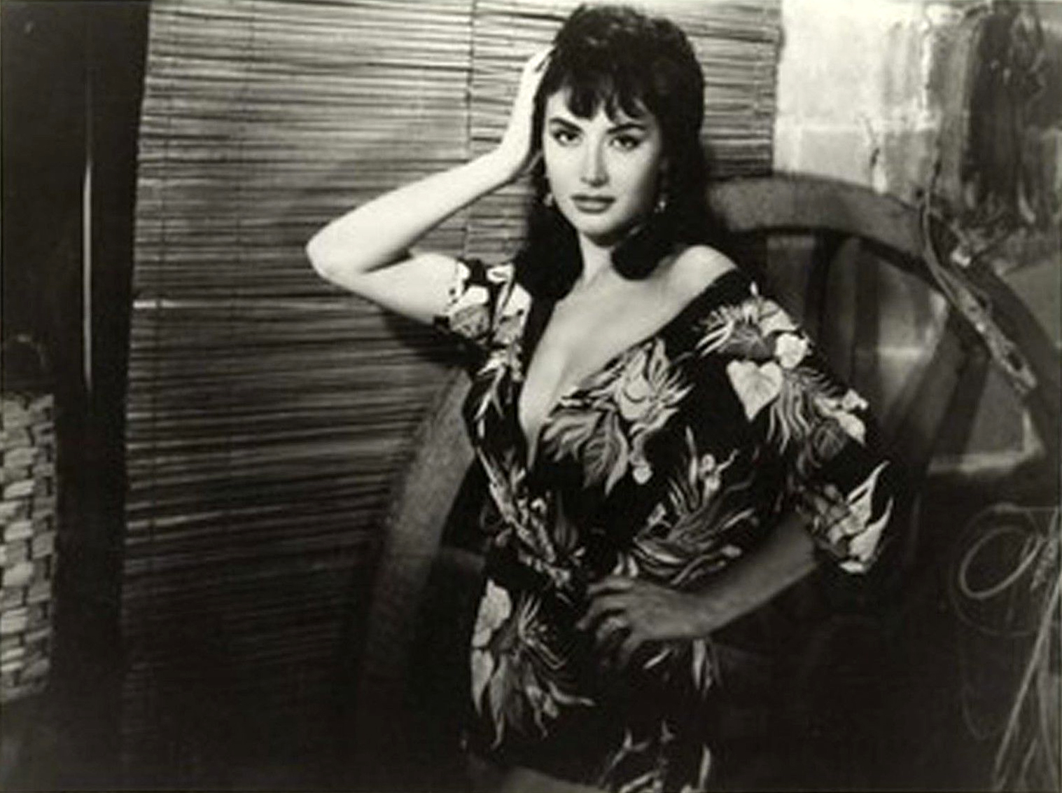 Isabel Sarli en El trueno entre las hojas, película de 1958